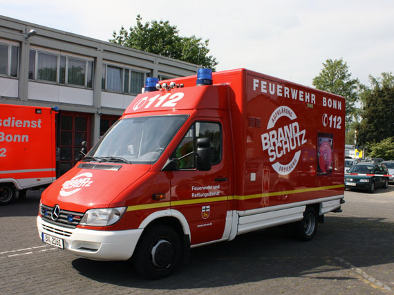 Infomobil Brandschutzerziehung